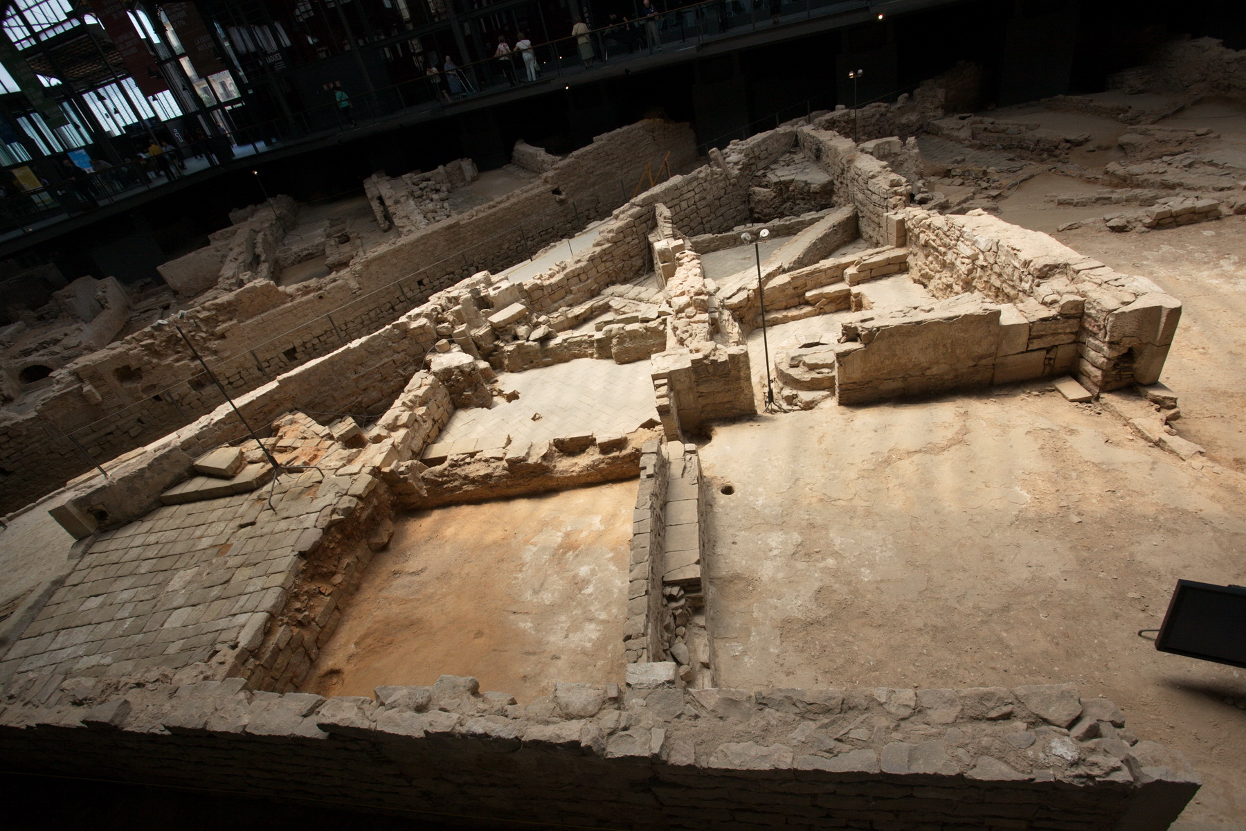 Jaciment arqueològic del Born (Barcelona, 1717). casa Corrales (n.4)